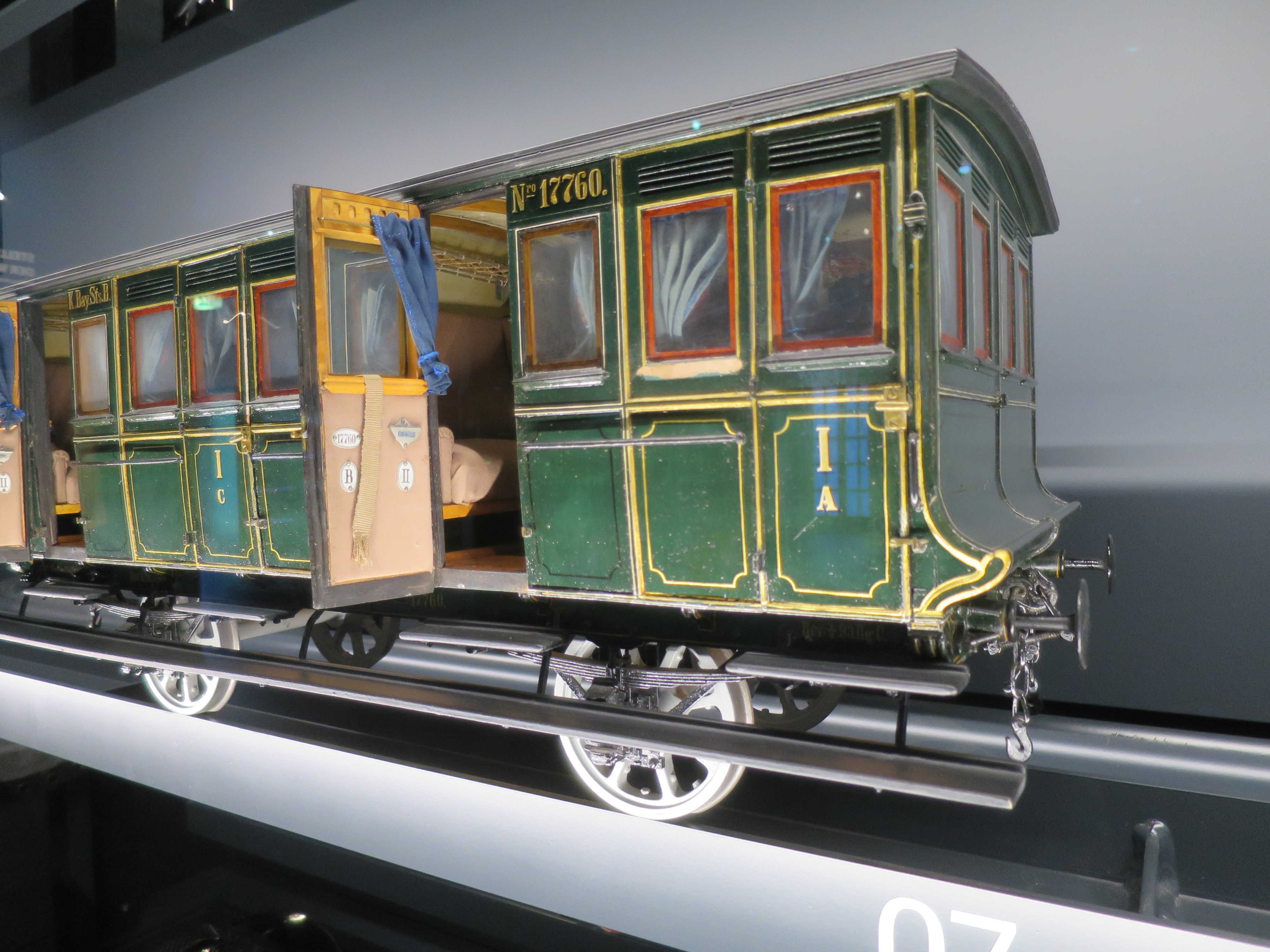 Halbabteilwagen; Modell im Verkehrsmuseum Nürnberg